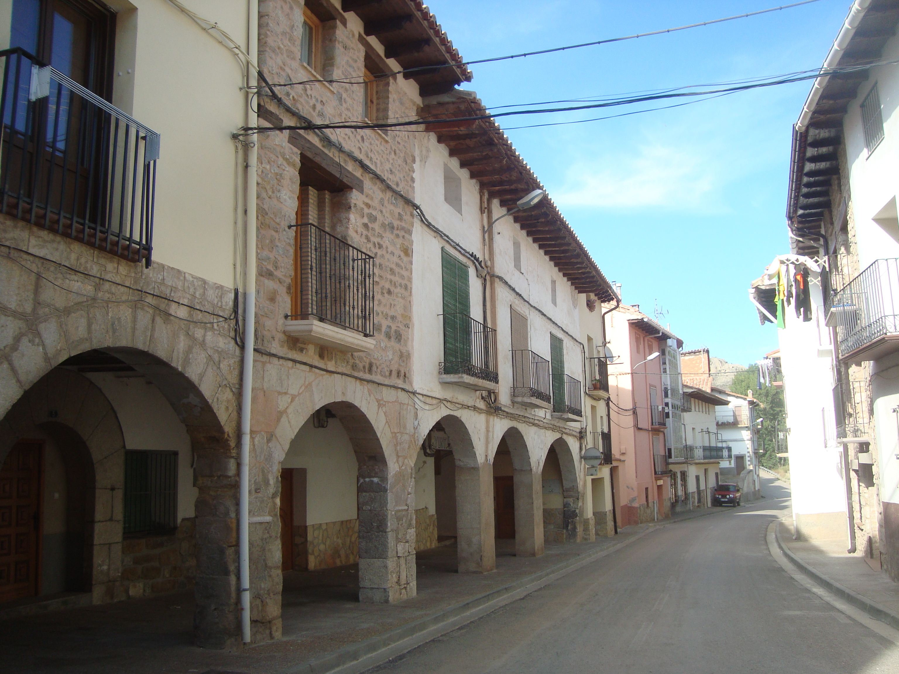 Calle de Aliaga (Teruel)